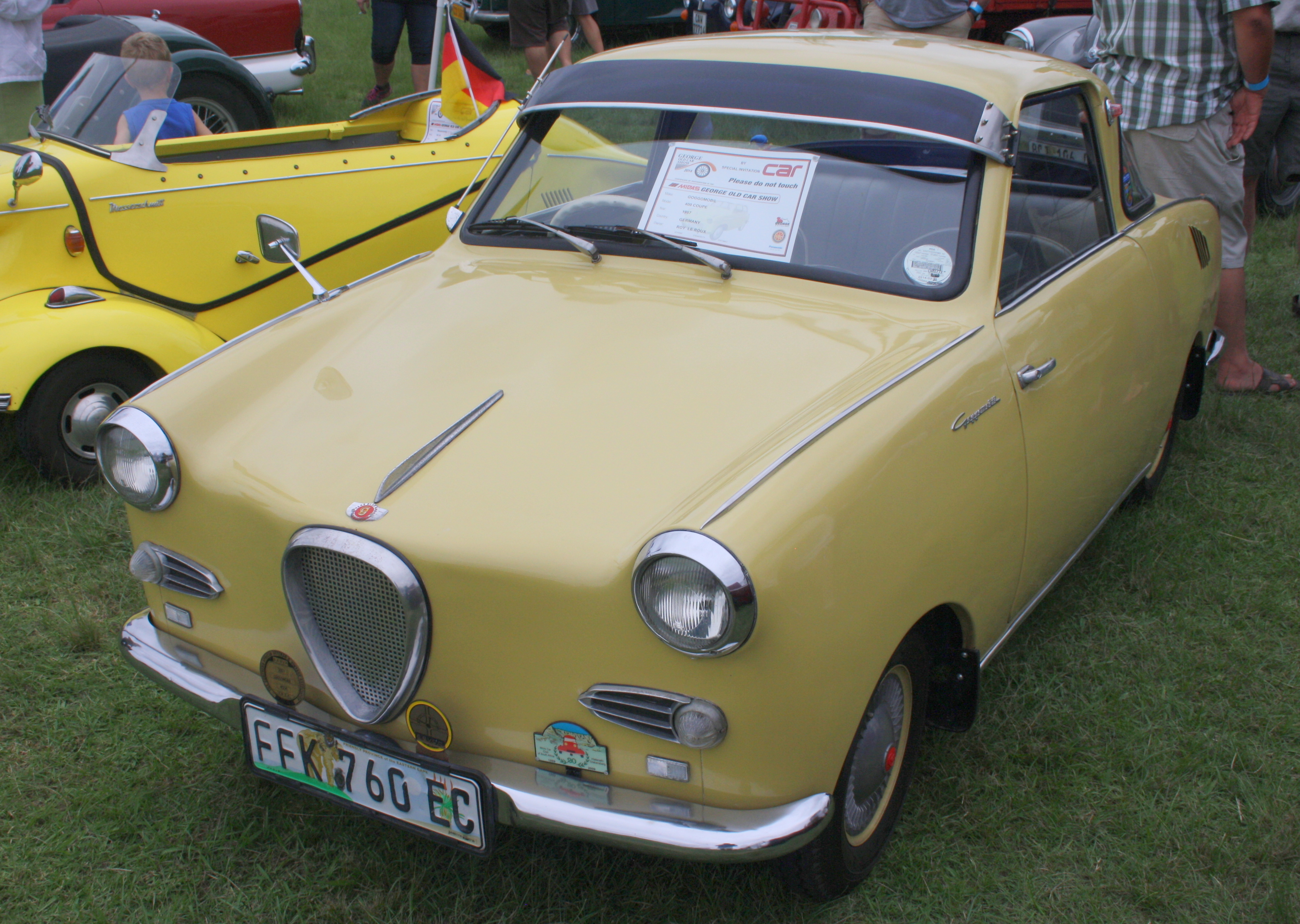 1957 Goggomobil 400 Coupe